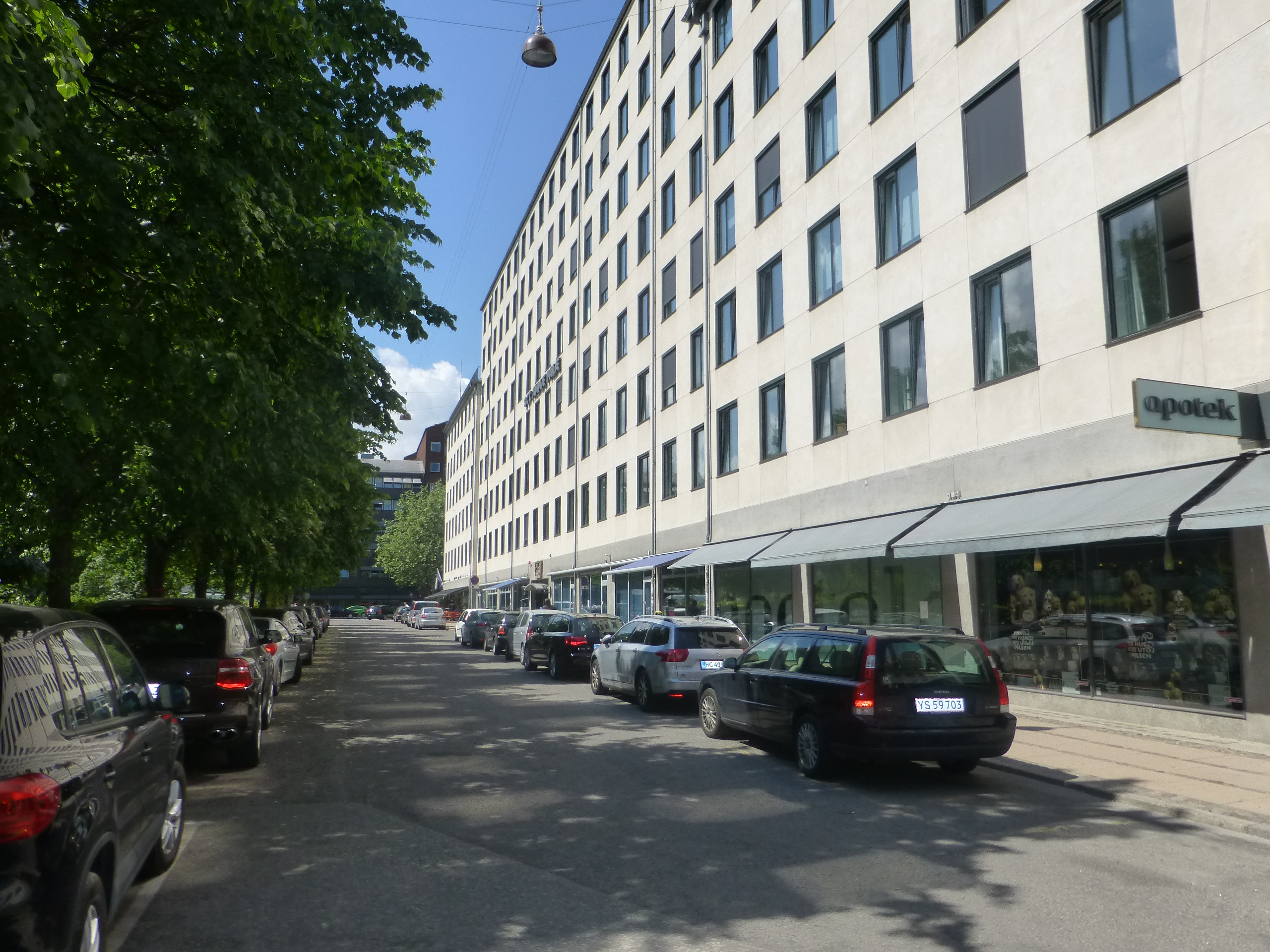 The street Landgreven in Indre By, Copenhagen.